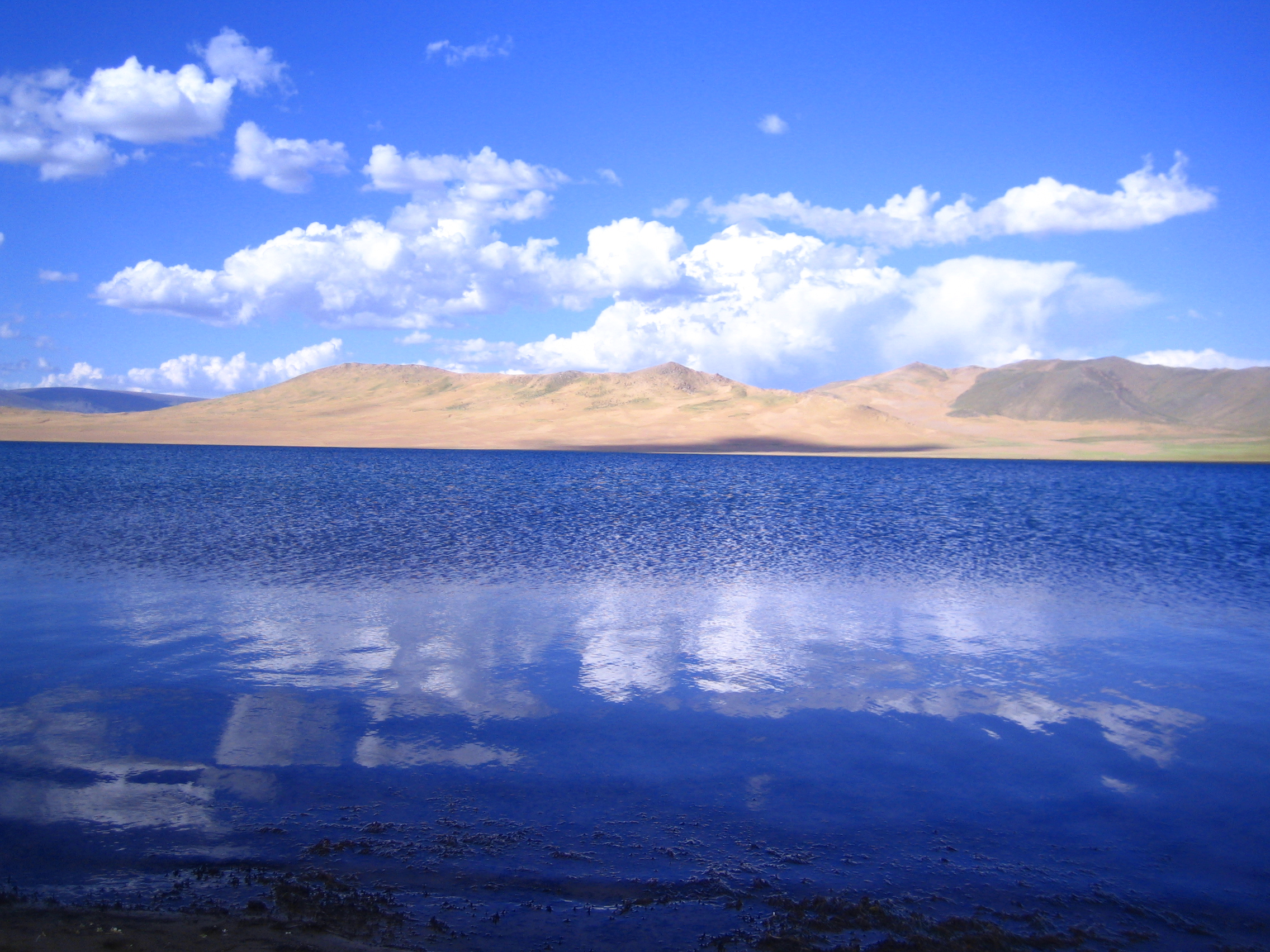 Ulaagchinii Khar lake